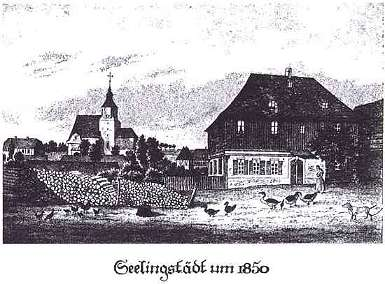 Diese Zeichnung aus dem 19. Jahrhundert zeigt die Seelingstädter Johannis-Kirche vor Ihrem Umbau, der vom Jahr 1894 bis 1898 erfolgte. Rechts neben der Kirche ist die alte Seelingstädter Schule, die von 1821 bis 1824 erbaut wurde, zu sehen. Ein neues Schulgebäude wurde 1894 an gleicher Stelle fertiggestellt und dient heute, nach umfangreicher Sanierung als modernes Schullandheim.